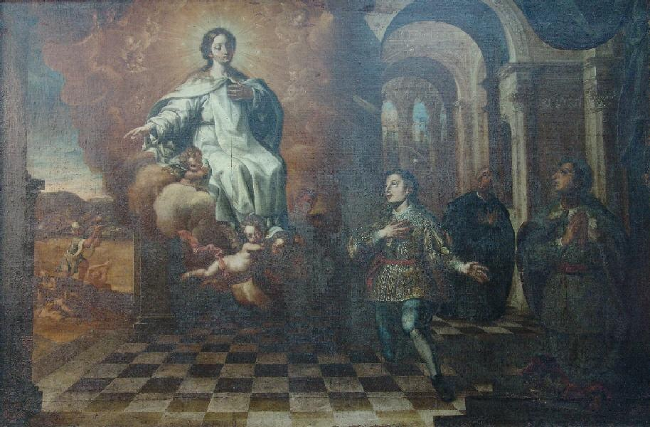 Aparición de la Virgen a San Pedro Nolasco, San Raimundo de Peñafort y el Rey Don Jaime de Aragónlabel QS:Les,"Aparición de la Virgen a San Pedro Nolasco, San Raimundo de Peñafort y el Rey Don Jaime de Aragón"